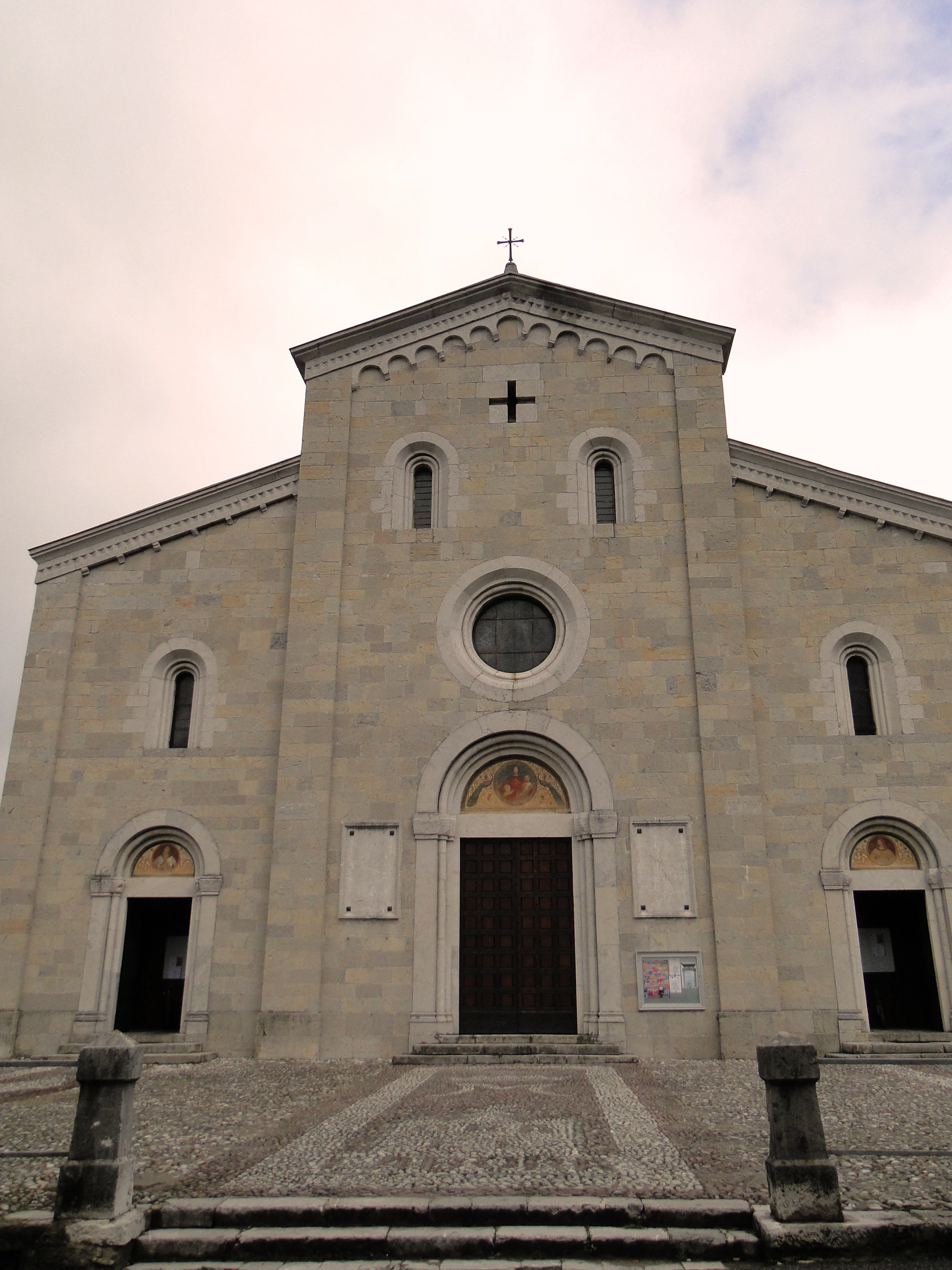 Abbazia san Benedetto in Vallalta, Abbazia di Albino (BG). Vista frontale della chiesa